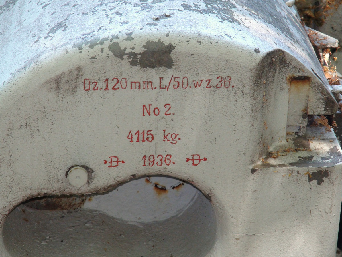 Faktyczne oznaczenie działa wybite na płasku obsady zamka i potwierdzające się w dokumentach archiwalnych.